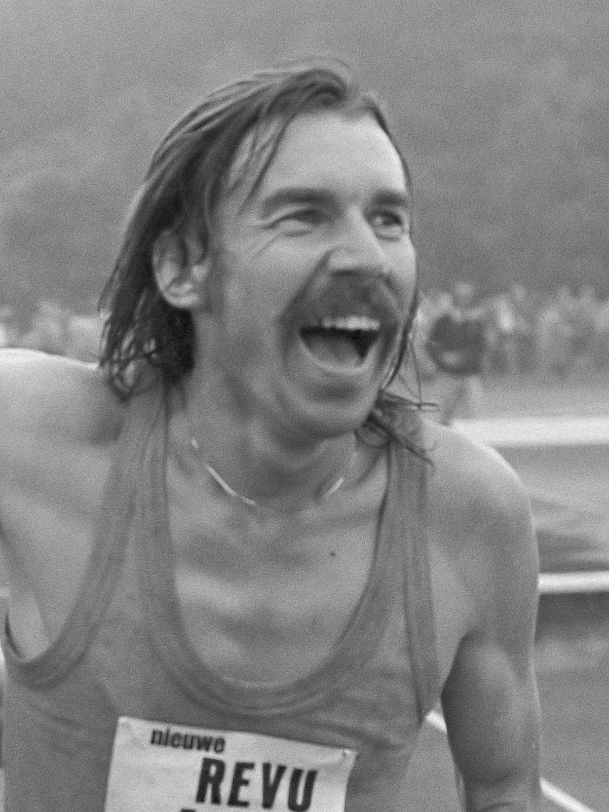 T.g.v. opening kunststofatletiekbaan "Brakkestein" in Nijmegen; Mc Loyd (l) en Quax na afloop 17 augustus 1977